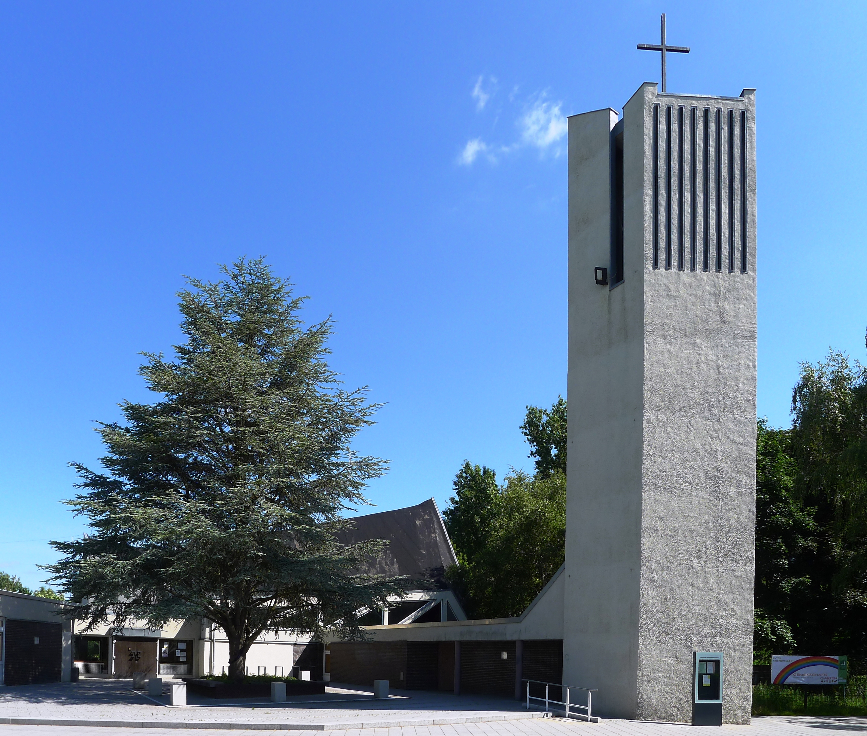 Blick auf die Kirche